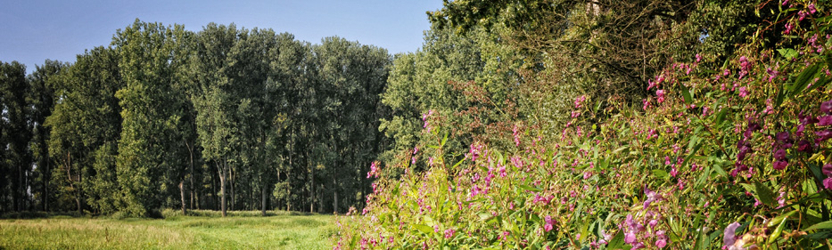 Birlinghovener Wald Grünes C